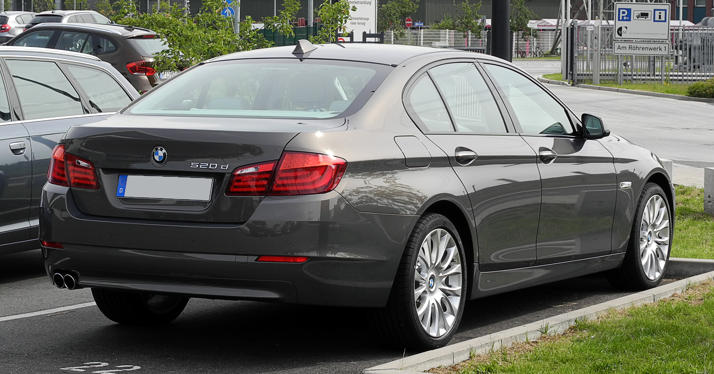 BMW 520d (F10)